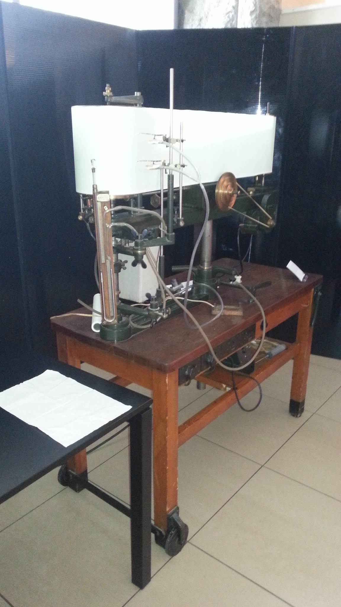 Un kymographe exposé à la bibliothèque universitaire de l'université Lyon 1.